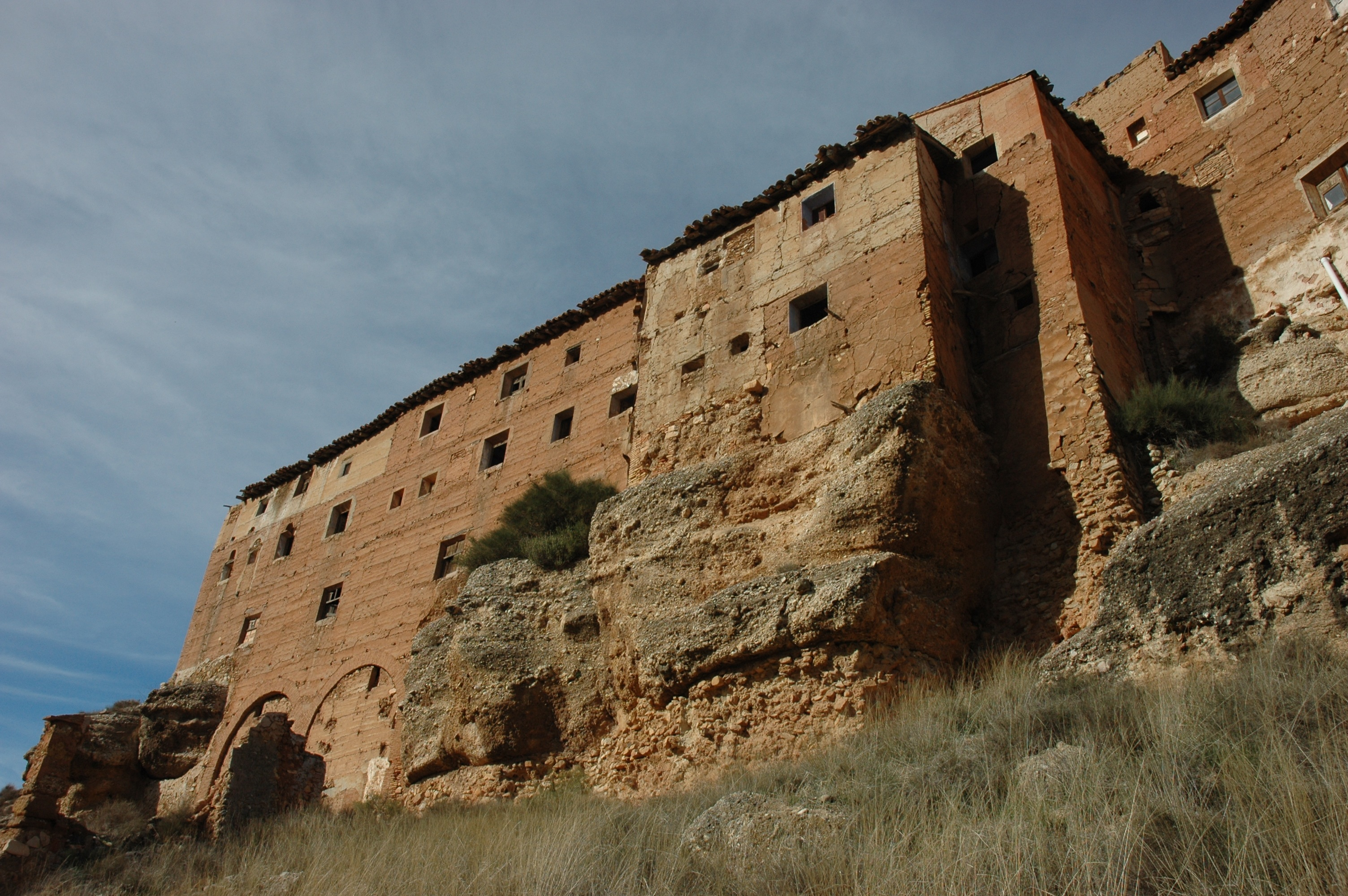 El santuario de Nuestra Señora de Arcos se encuentra ubicado en lo alto de un promontorio de la Sierra de Arcos, atravesada por el río Martín, y perteneciente al municipio turolense de Albalate del Arzobispo, ubicado en la comarca del Río Martín. Se trata en realidad de un complejo de edificios entre los que destacan la iglesia y la hospedería. Todo el conjunto está construido usando materiales como ladrillo, tapial y mampostería de la piedra de la zona. El acceso al conjunto se hace a través de una escalinata situada en la cara Norte que desemboca, por medio de un arco, en un atrio abierto. La iglesia, construida en ladrillo, data del siglo XVII, y está separada en dos partes por un cancel. La primera parte, está compuesta por tres naves con cuatro tramos cada una, cubiertas con bóvedas de arista, en la nave central; y bóvedas de cañón con lunetos en las naves laterales. La segunda parte, engloba la capilla mayor, la cual se encuentra a distinto nivel, y separada por medio de un cancel. Dicha capilla tiene una planta cuadrada, cubierta por una gran cúpula semiesférica. Detrás del altar mayor, se encuentra una camarilla donde se colocaba la imagen de la Virgen antes de su destrucción en la Guerra Civil. Tanto la hospedería como el resto de edificios del conjunto tienen planta alargada y tres alturas.